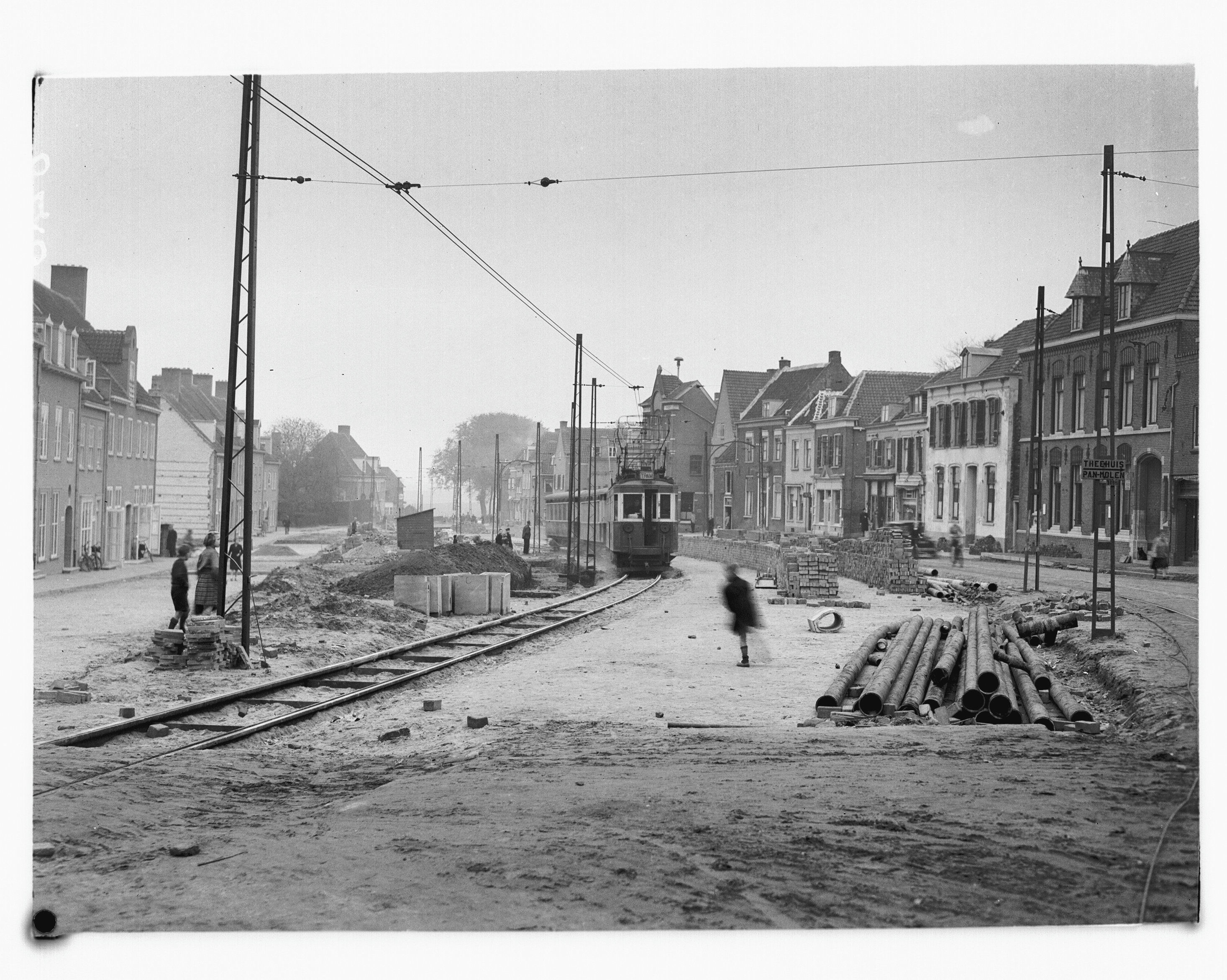 verlegging Trambaan na wederopbouw van oorlogsschade uit 1940